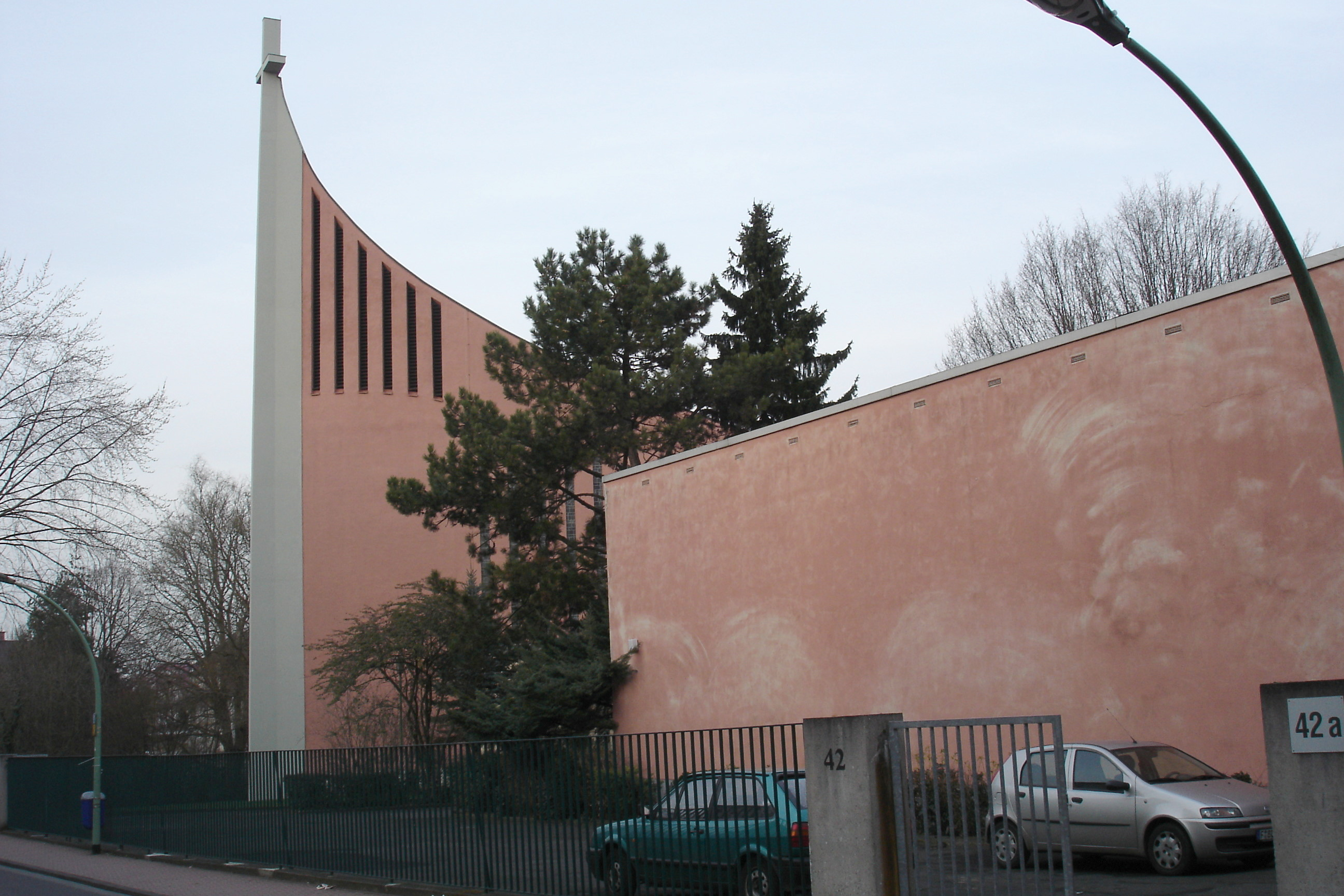 St. Christopheruskirche in Ffm-Preungesheim